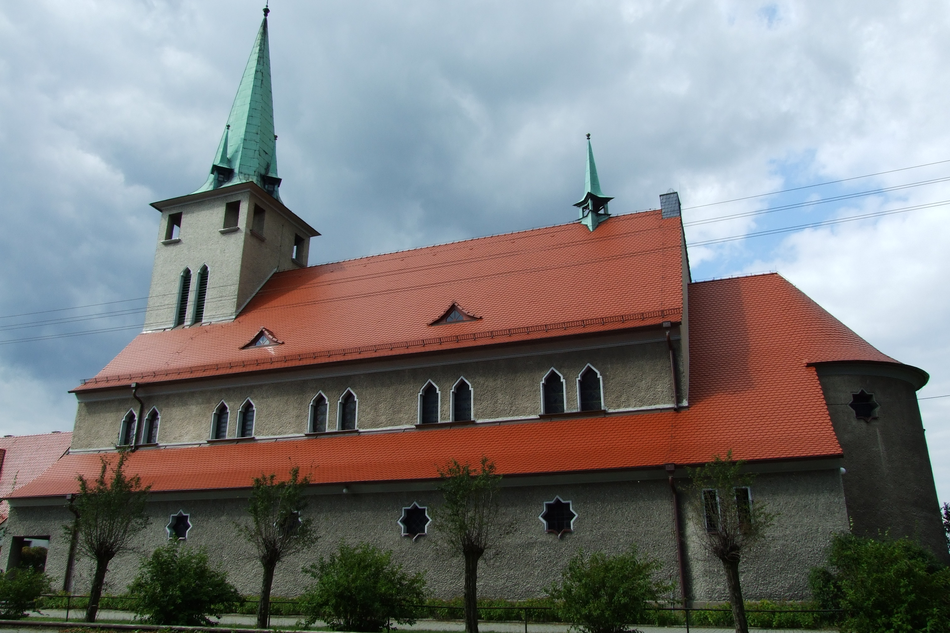 Kościół pw. św. Jadwigi w Łagiewnikach Małych